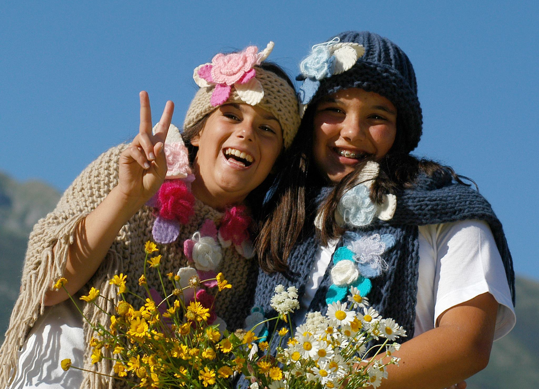 ciao